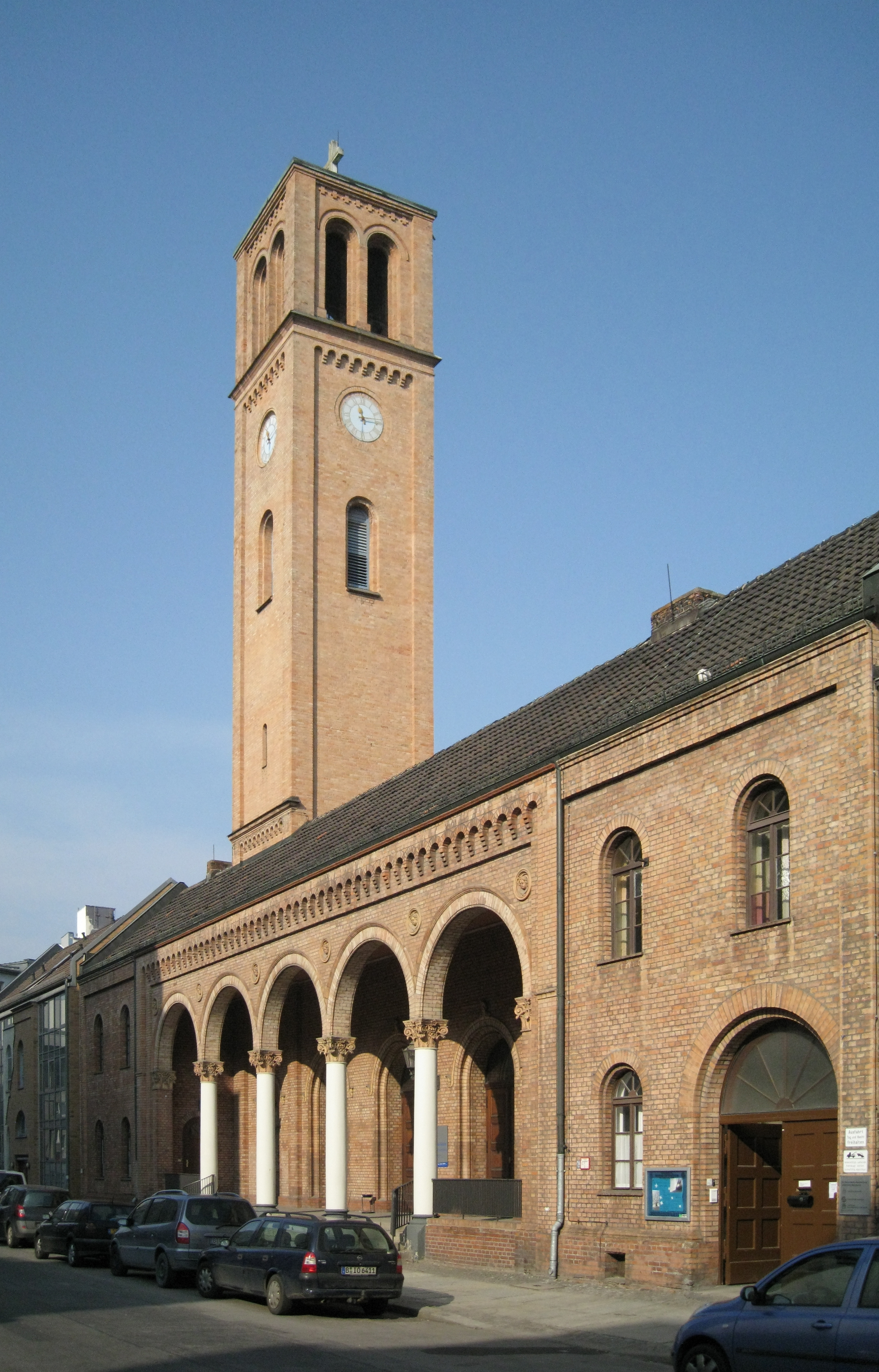 Straßenfront der St.-Lukas-Kirche nach dem Wiederaufbau